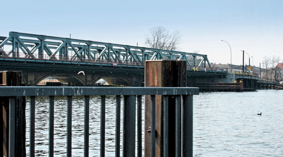 Die Lange Brücke über die Dahme in Berlin-Köpenick, von Nordosten aus gesehen (Blick auf Spindlersfeld). Vorne die zweiteilige Stahl-Behelfsbrücke von 1995, dahinter die historische steinerne Brücke, die von 1995–1998 grundsaniert wurde. (Fotoaufnahme vom März 2007)